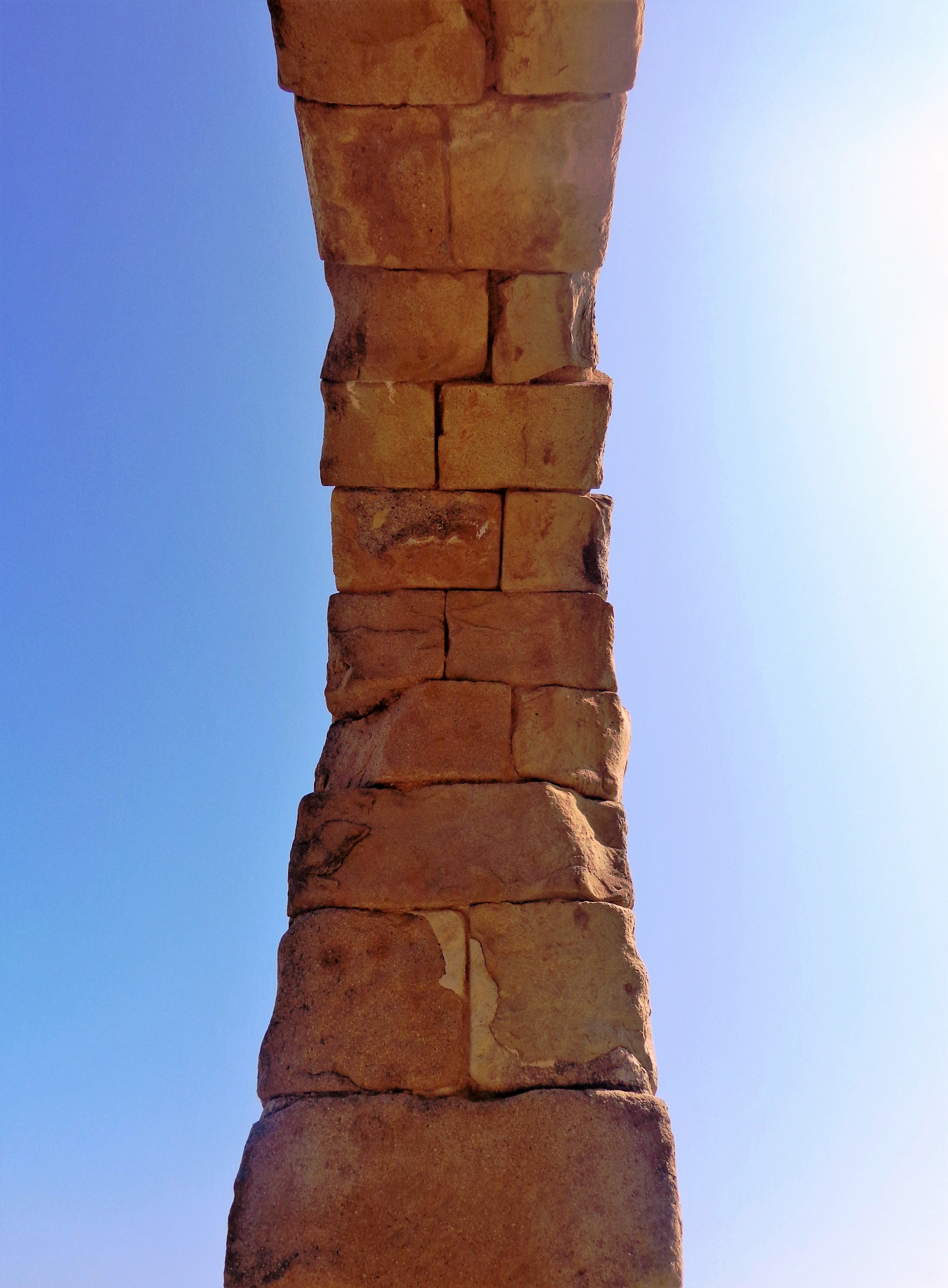 Gymnasium - arco. 08 settembre 2012 (Escursione Tindari, Santuario e area archeologica). Scatto fotografico altresì presente negli album caricati sui profili personali di Facebook, Panoramio, Google, etc.